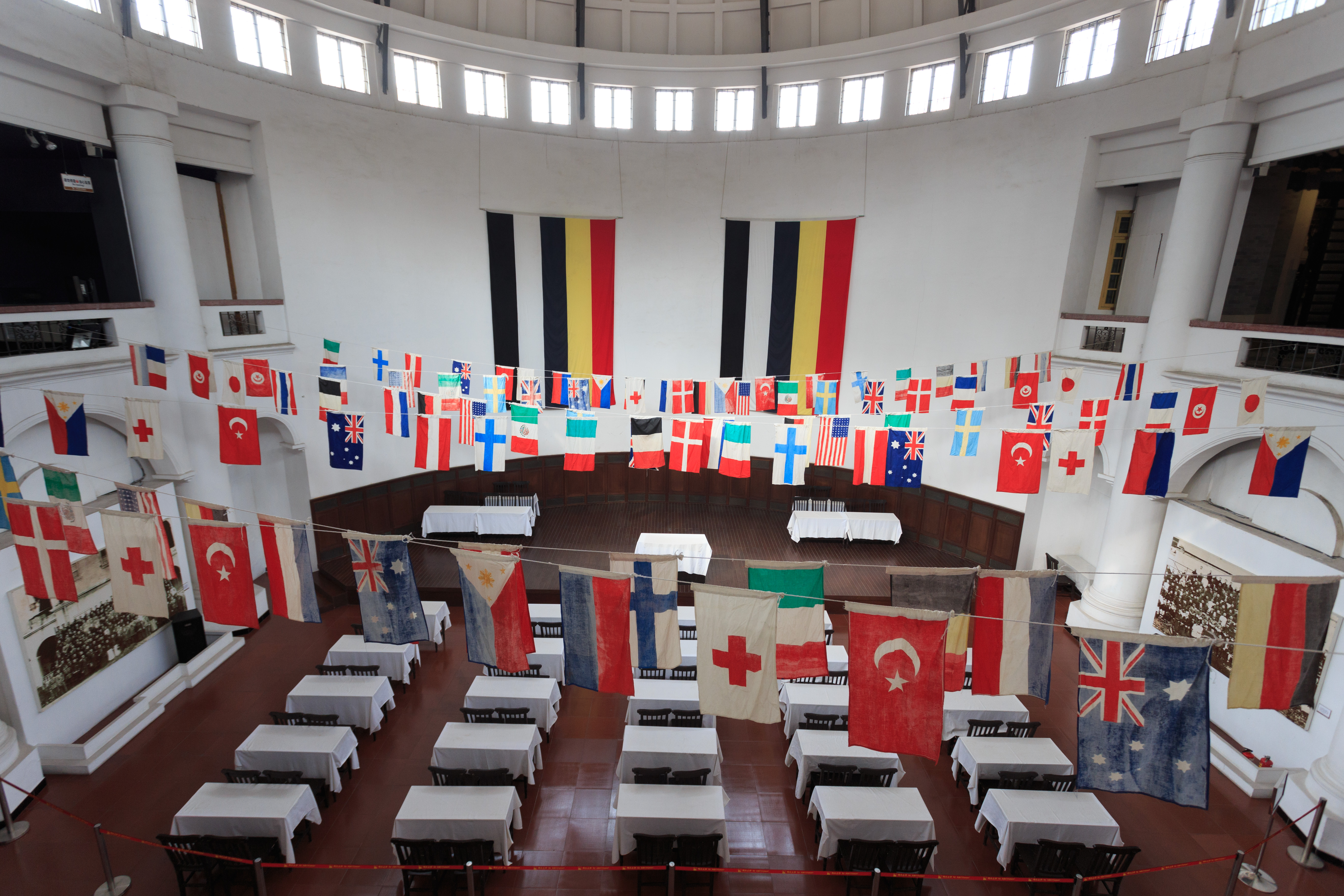 广州广东咨议局旧址（广东革命历史博物馆、广州近代史博物馆） 粵語: 广东革命历史博物馆、广州近代史博物馆